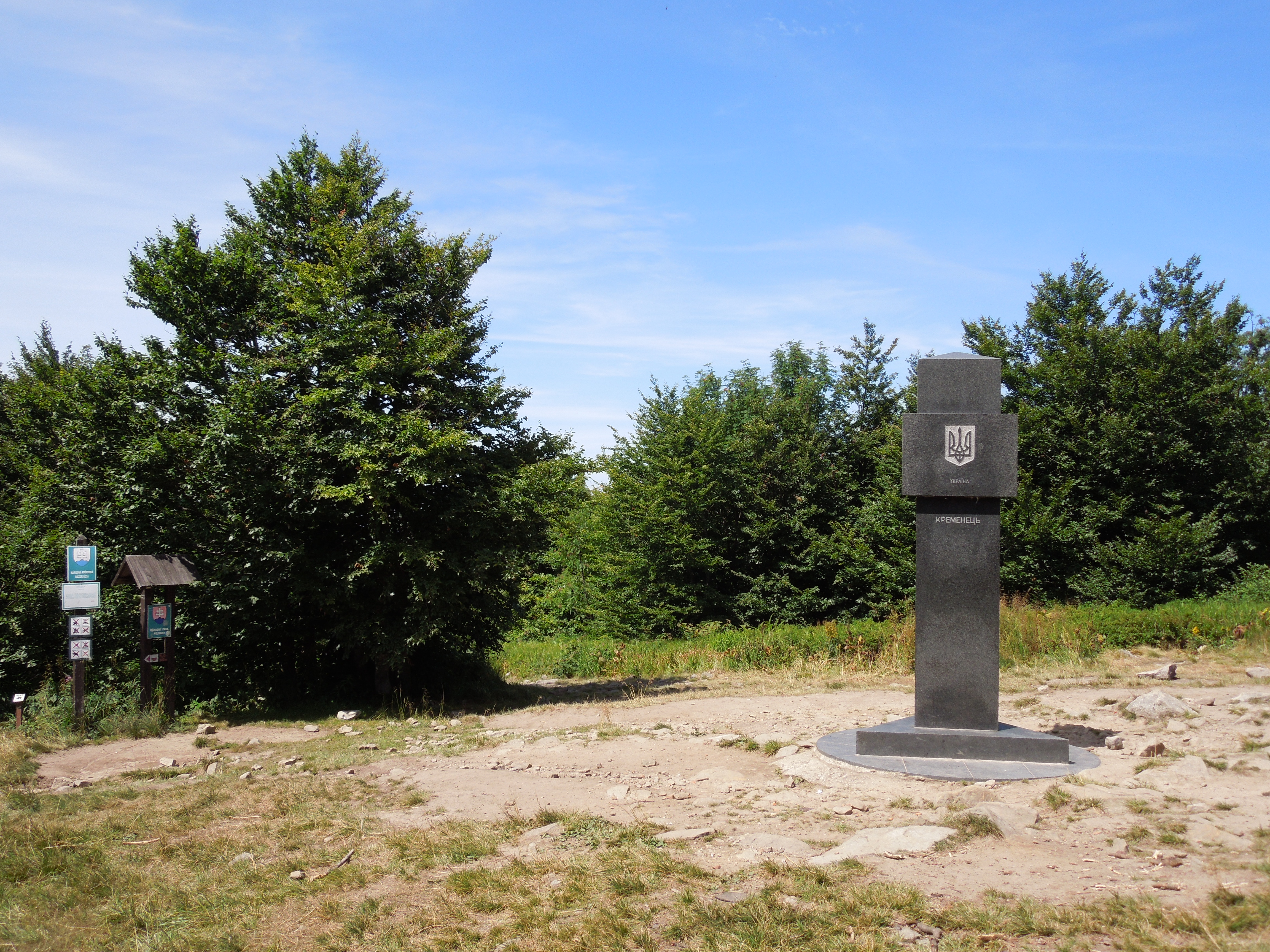 Trojhraničný (SK/PL/UA) stĺp na vrchu Kremenec, najvýchodnejší bod Slovenska (miesto: Bukovské vrchy, Národný park Poloniny) This is a photography of Natura 2000 protected area with ID SKUEV0229 This is a photography of Natura 2000 protected area with ID SKCHVU002 This is a photography of Natura 2000 protected area with ID PLC180001